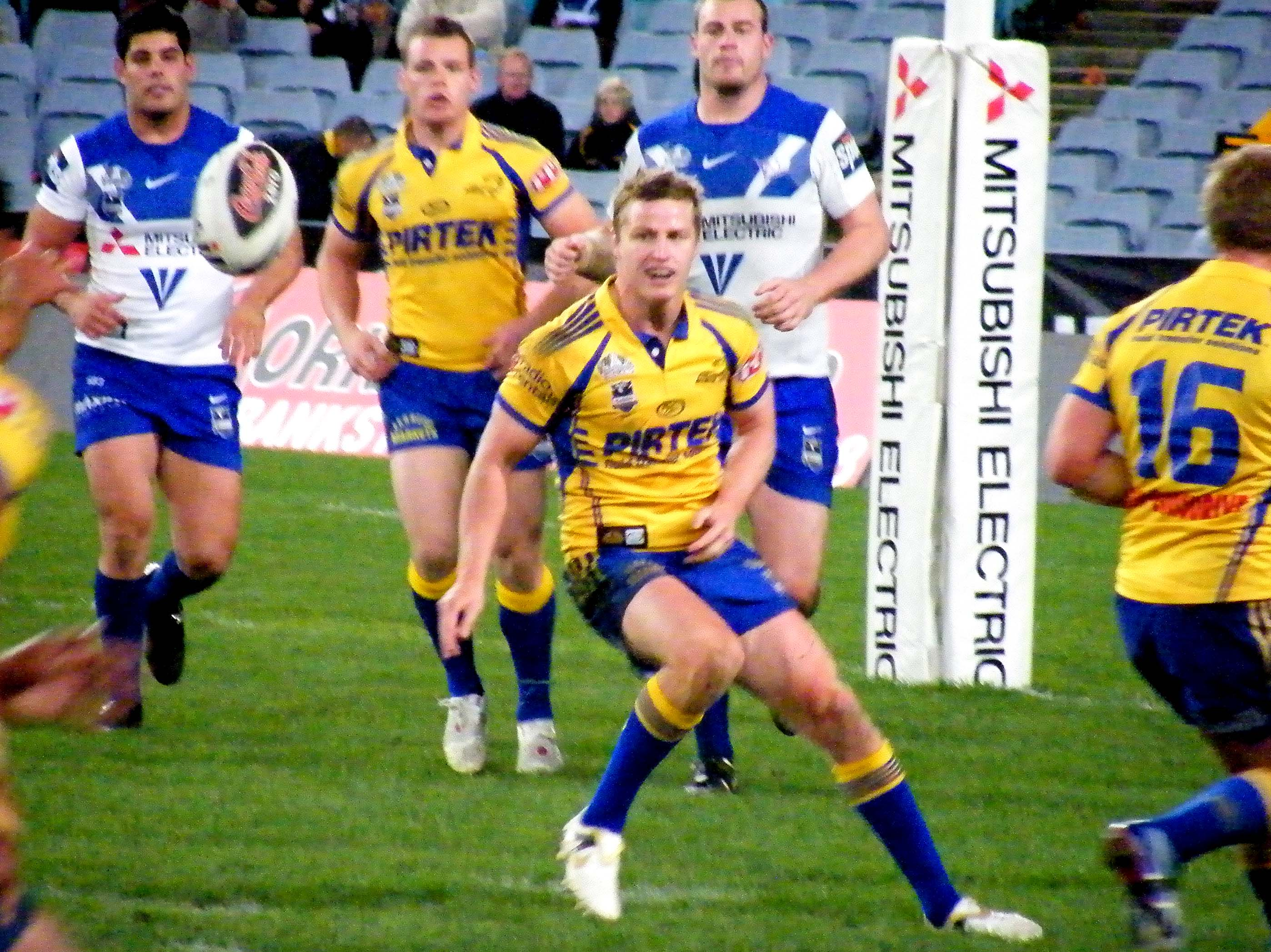 Parramatta Eels Halfback Brett Finch